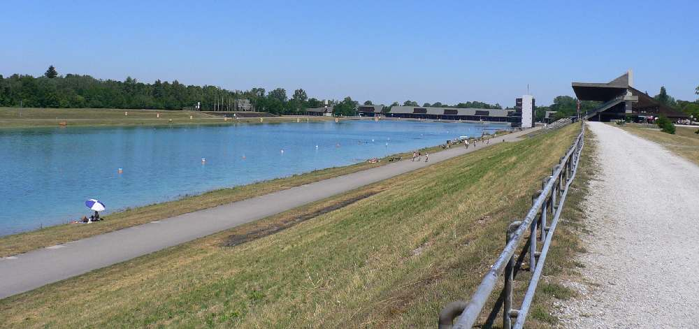 Olympia-Regattastrecke Oberschleißheim bei München.